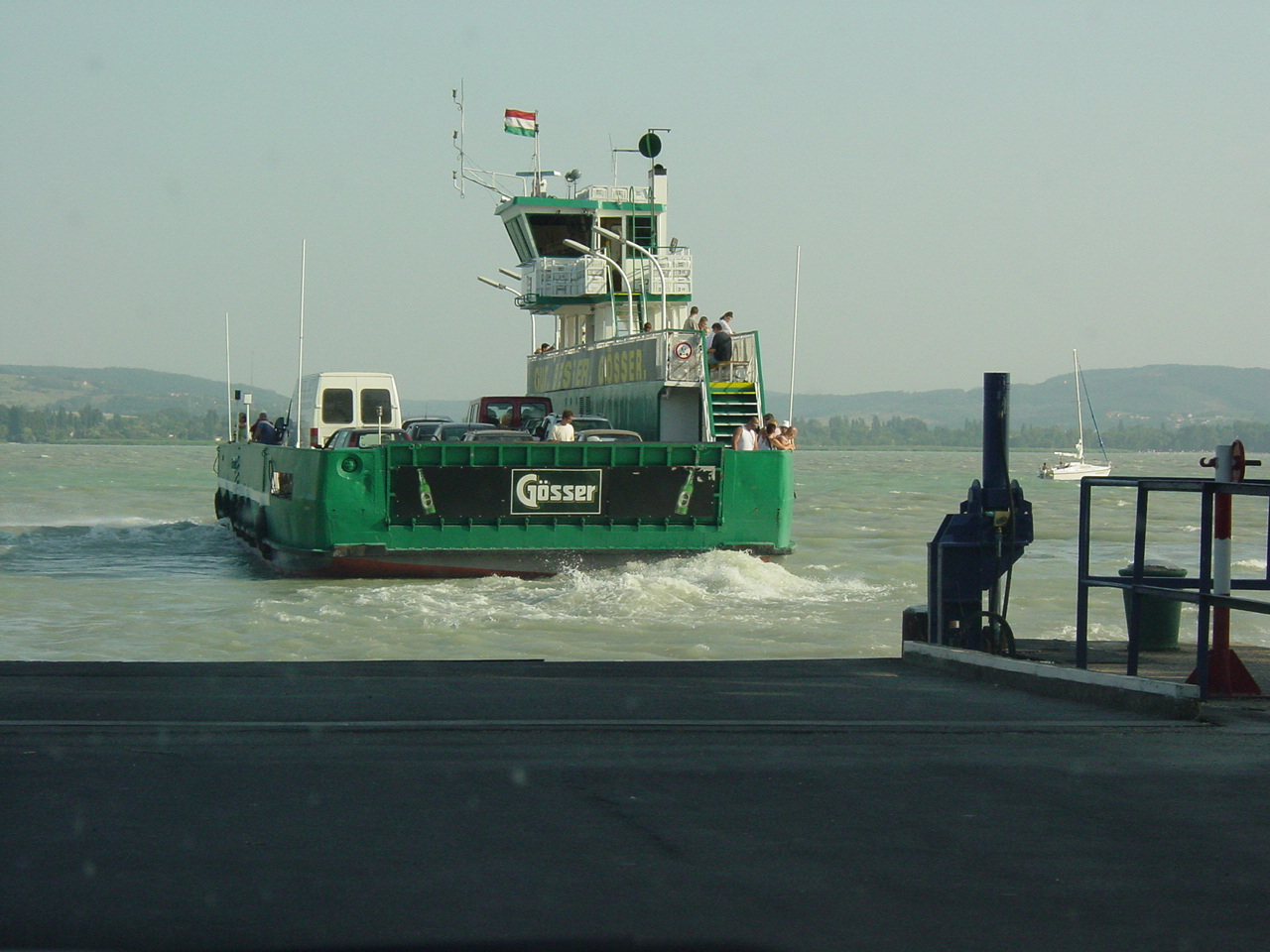 Balaton. Stako July 2003